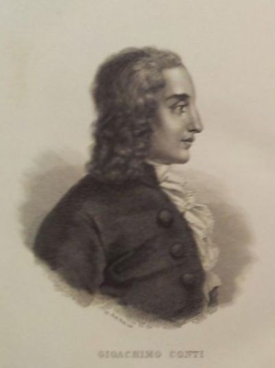 Bildnis des Gioacchino Conti alias Gizziello